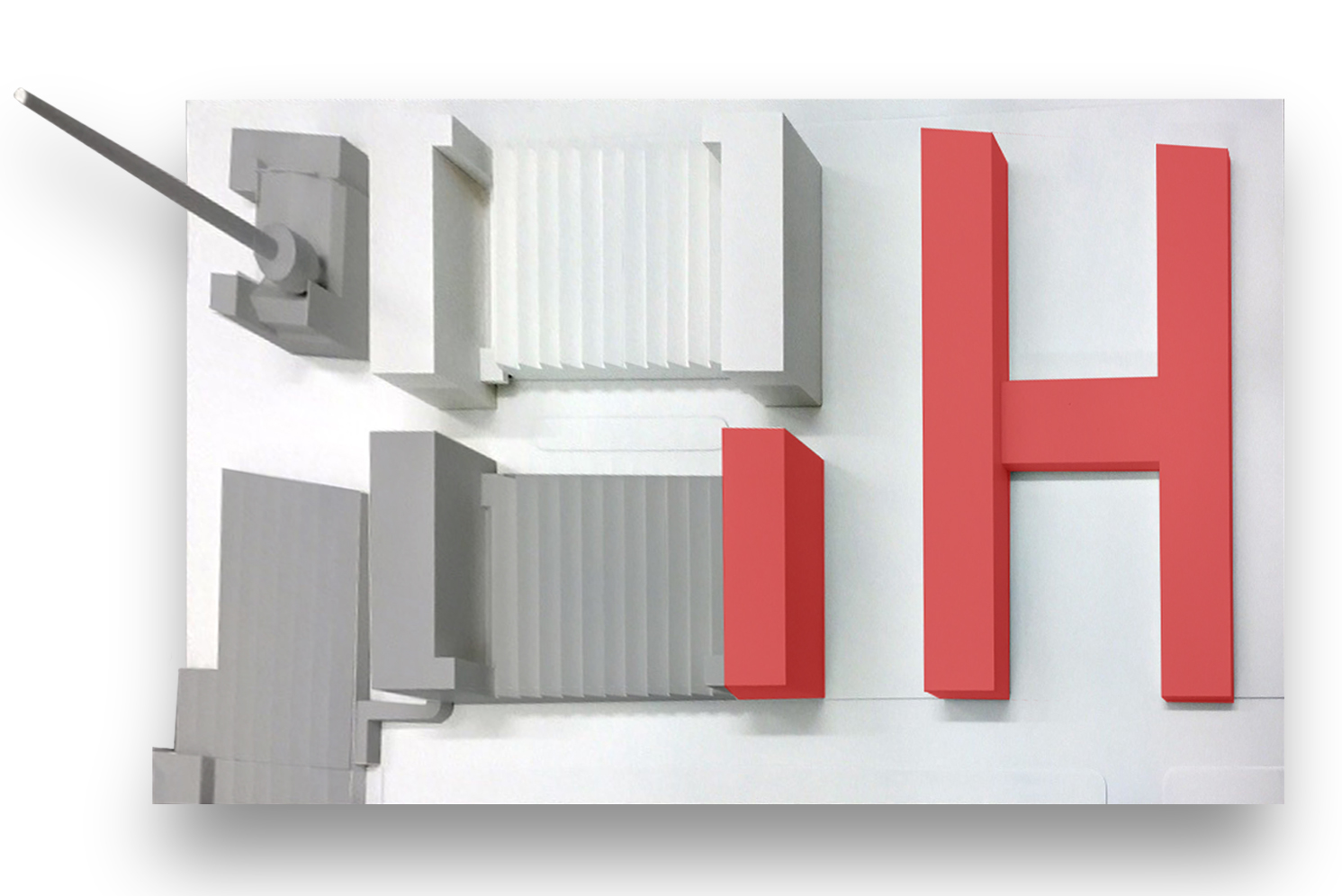 Das Modell zeigt den möglichen Masterplan Ludwig Mies van der Rohes für die Gebäude der VerseidAG.